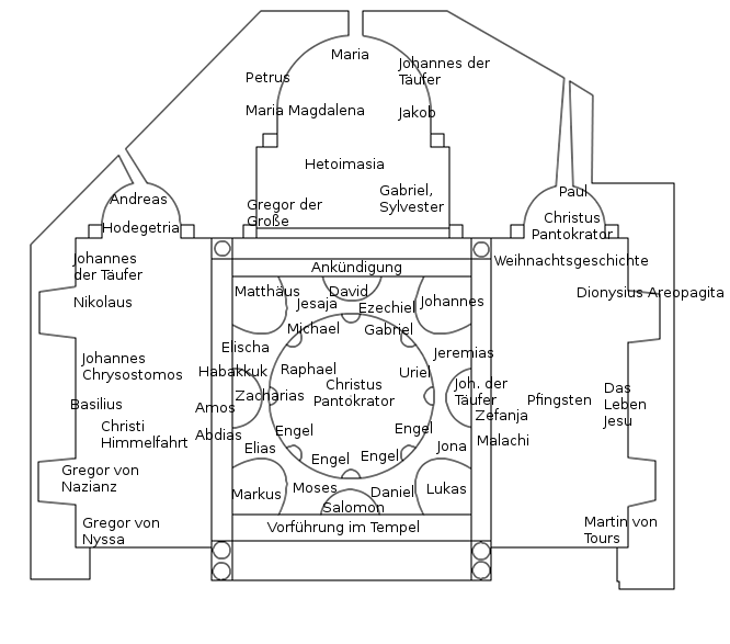 Das Bildprogramm des Chores der Cappella Palatina in Palermo. Habe das in AutoCAD mit Augenmaß nach etwas unscharfer Vorlage erstellt, die ich im Internet gefunden habe (Quelle leider dort nicht angegen: ). Maßstab unbekannt. Wahrscheinlich eignet es sich trotzdem zur Illustration, deshalb habe ich es mal hochgeladen.